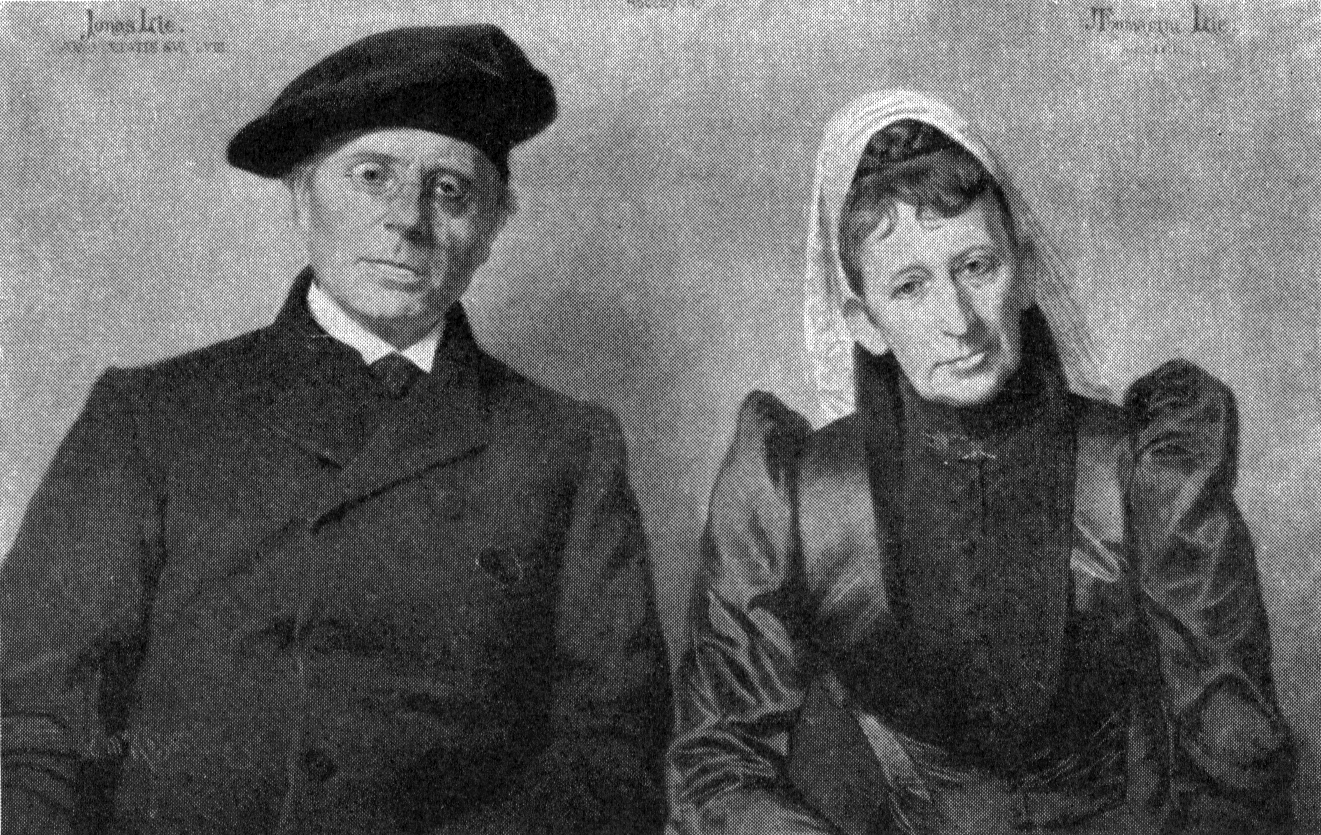 Norwegian: Jonas og Thomasine Lie.